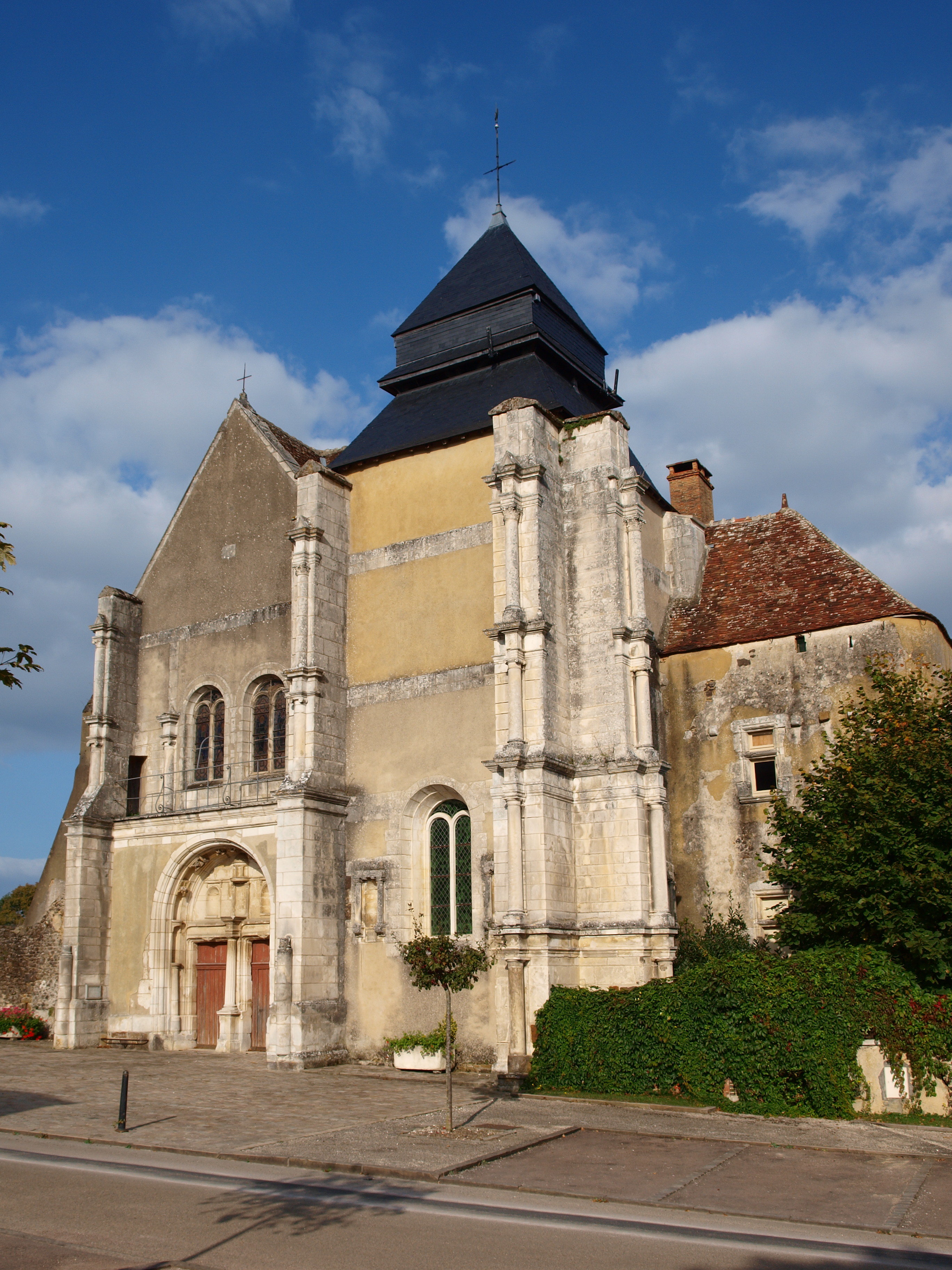 Diges (Yonne, France) ; l'église Saint-Martin